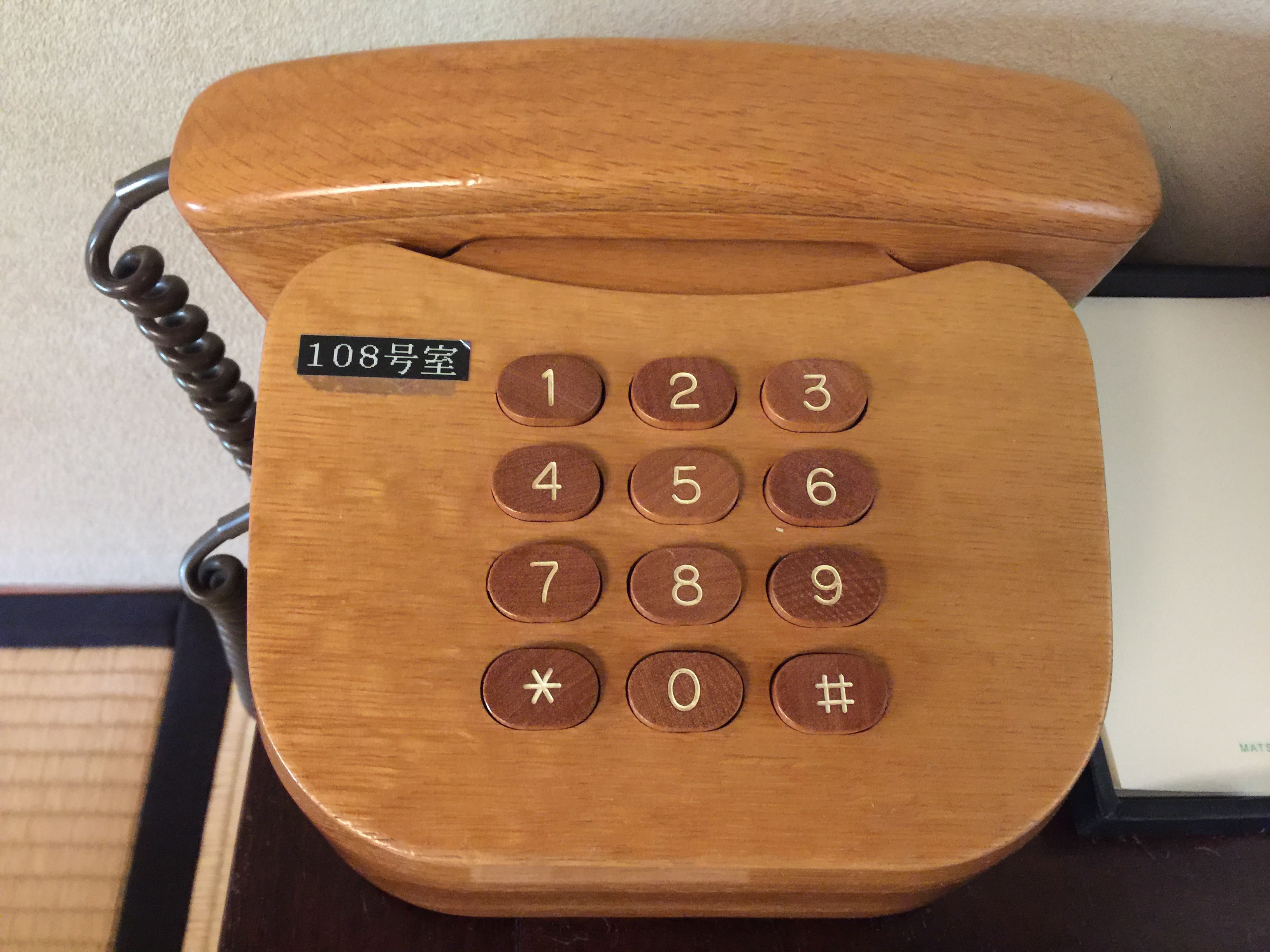 松田屋ホテル